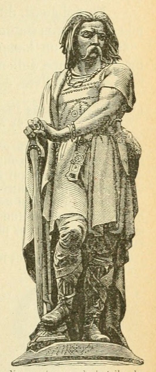 Le tour de la France par deux enfants, par George Bruno, manuel scolaire, édition de 1904.